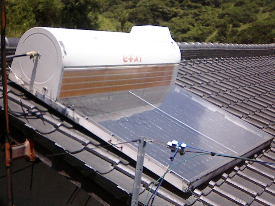 太陽熱温水器 - 太陽熱で水を温めて給湯などに利用するための装置。